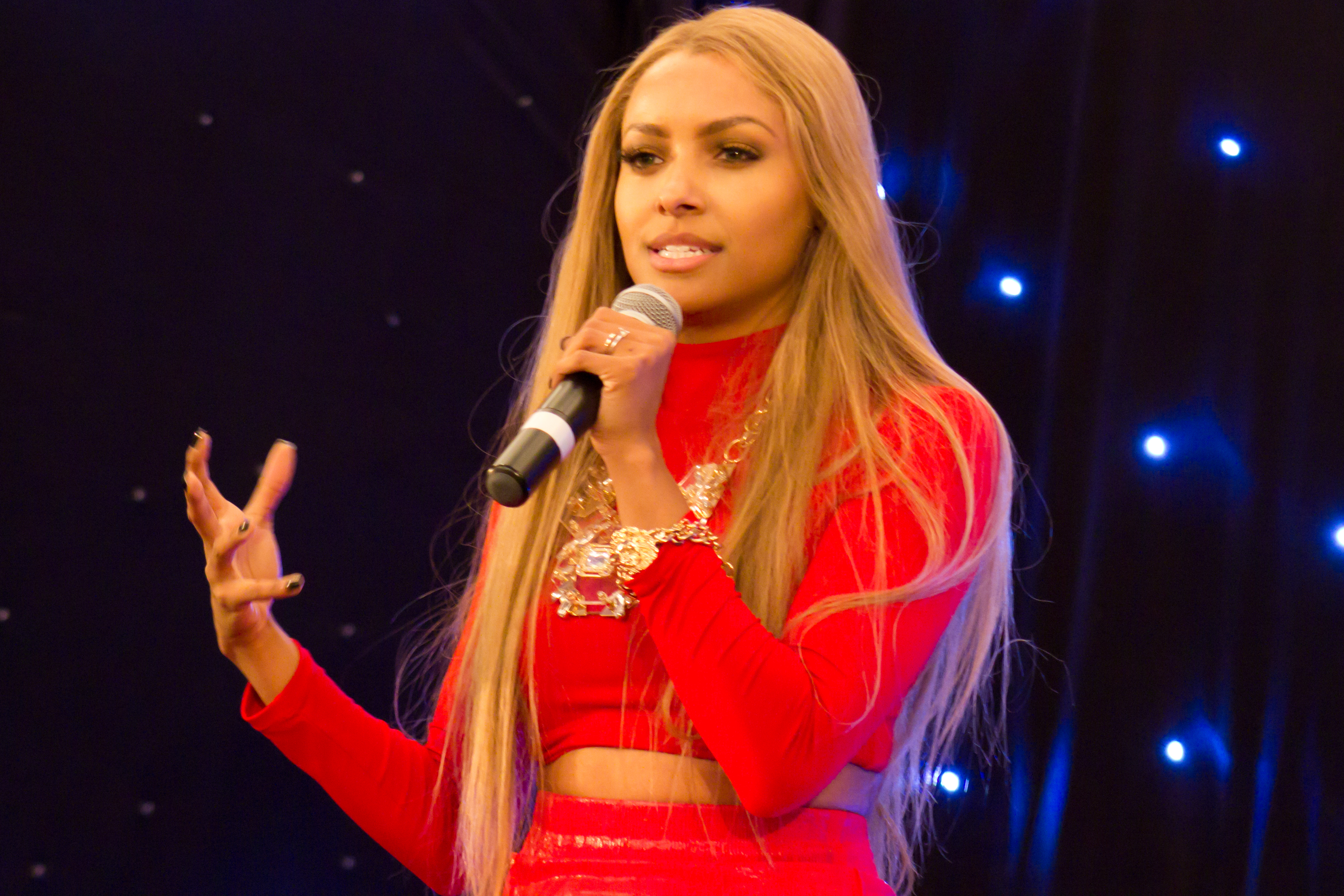 Kat Graham